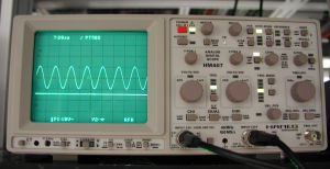 oscilloscope